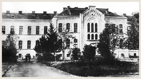 Srpski (latinica): Zgrada hiirurškog paviljona Centralne vojne bolnice na Vračaru, Beograd, Srbija